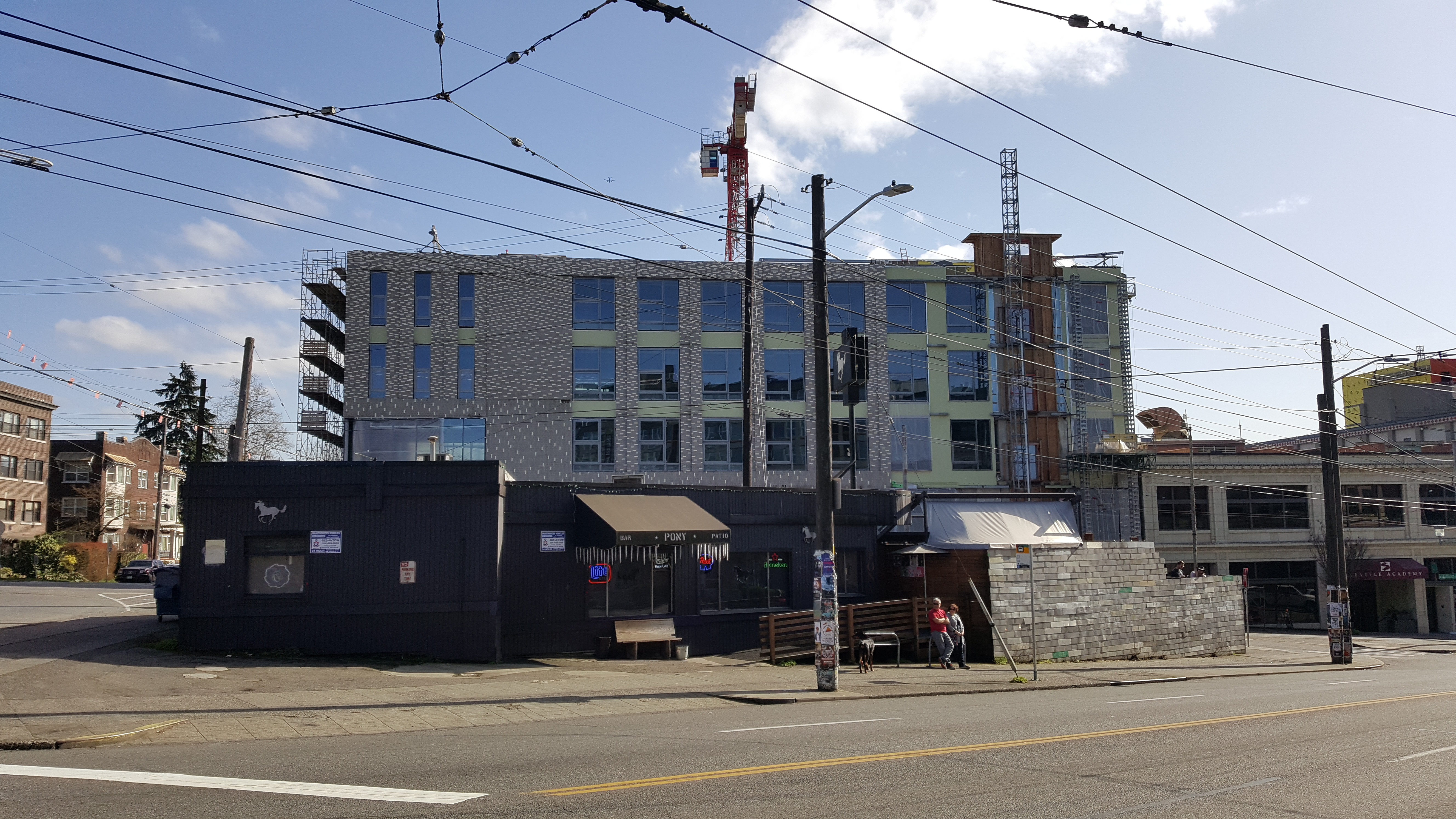 Pony